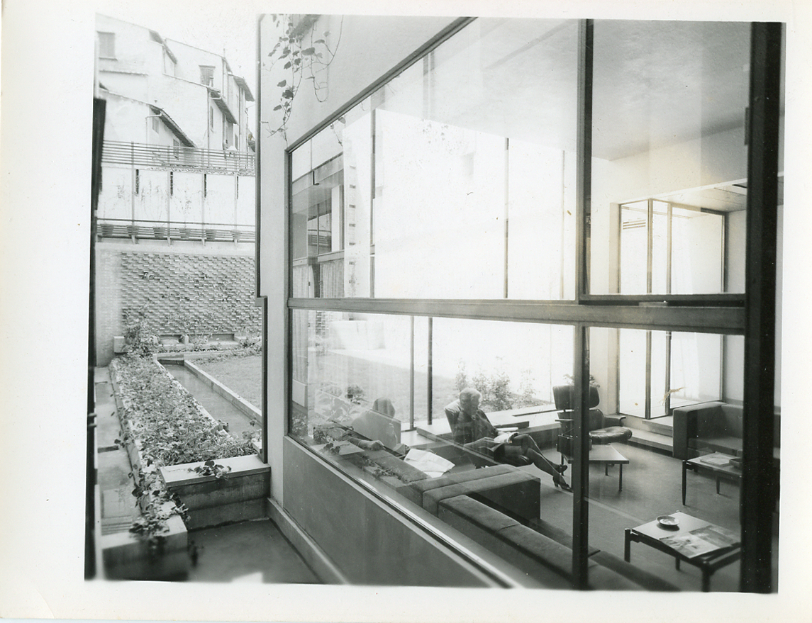 Firenze. Albergo Minerva realizzato dall'architetto Edoardo Detti con la collaborazione dell'architetto Carlo Scarpa. Particolari architettonici degli spazi comuni interni. Servizio fotografico : Firenze, 1975 / Paolo Monti. - Fototipi: 23 : Positivo b/n, gelatina bromuro d'argento/ carta, provino a contatto da pellicola 10x15. - ((Serie costituita da 23 provini a contatto identificati con i nn.: 78/A-81/A, 83/A-85/A, 91/a-92/A, 94/A, 97/A-98/A, 101/A, 103/A-106/A., 108/A-110/A, 112/A, 123/A. La suddetta serie è contenuta nella scatola 178/2 contenuta all'interno della iscatola 178. Sul coperchio della scatola 178/2 manoscritto: "Arch. Detti/ Albergo Minerva/ foto/ Paolo Monti". Sul coperchio della scatola 178 iscrizione manoscritta a pennarello: "Provini.". - Fonte: Rubrica di Paolo Monti: Archivio 10x12 (ultimi numerati) - dal G1 al (s.d.), presso Archivio Paolo Monti